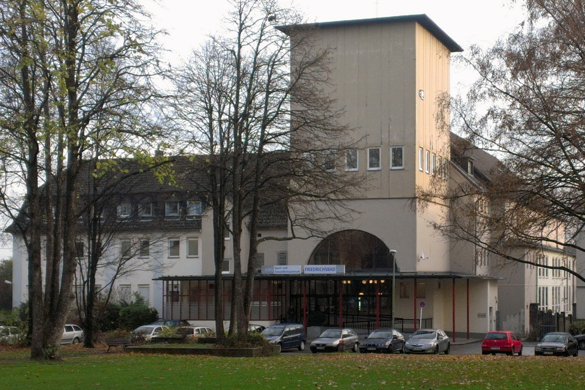 Das Friedrichsbad, ein Hallenschwimmbad in Essen-Frohnhausen